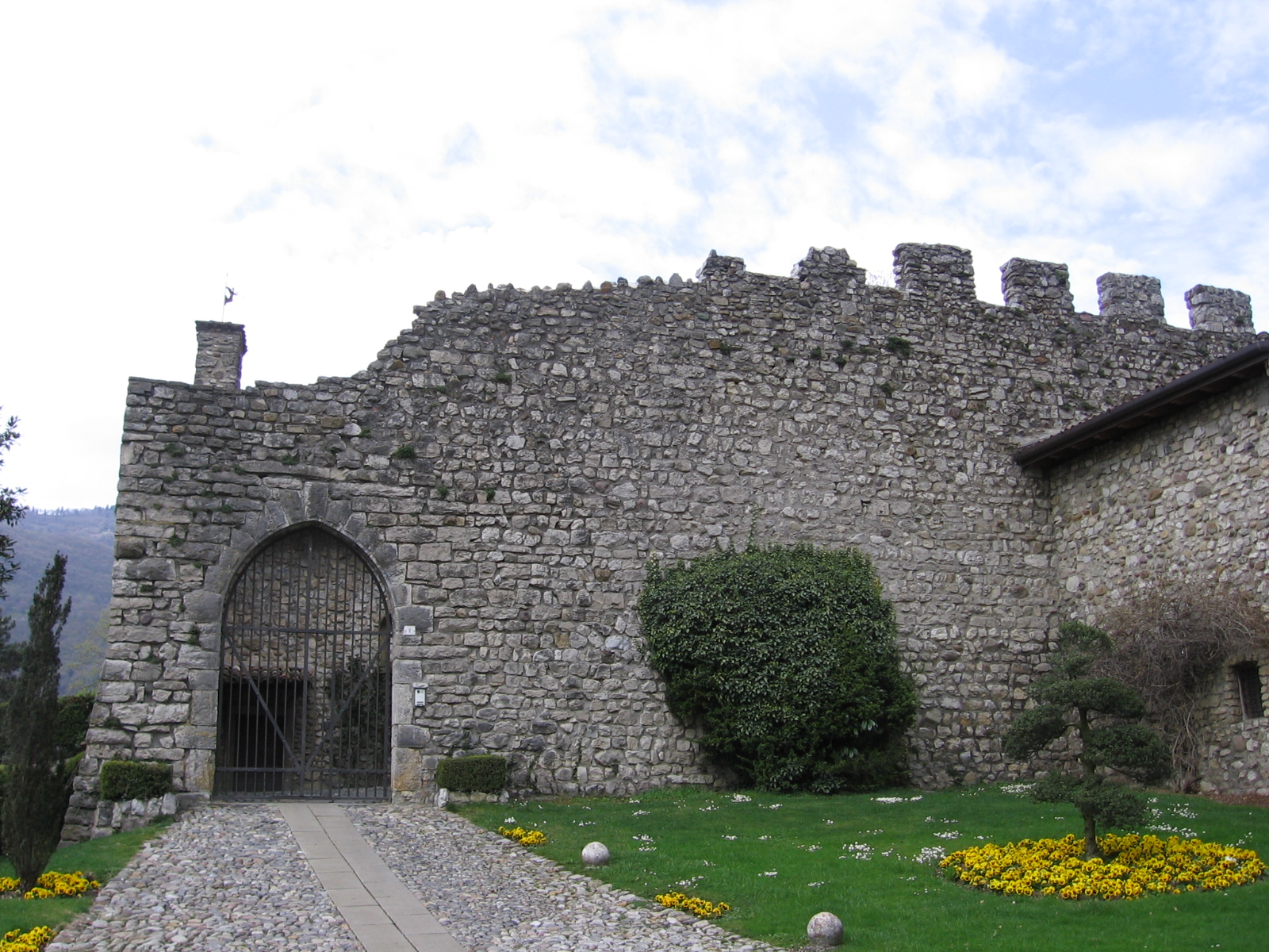 Monasterolo del castello, Bergamo, Italia